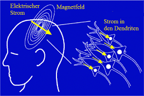 Entstehung des Magnetfelds im Gehirn